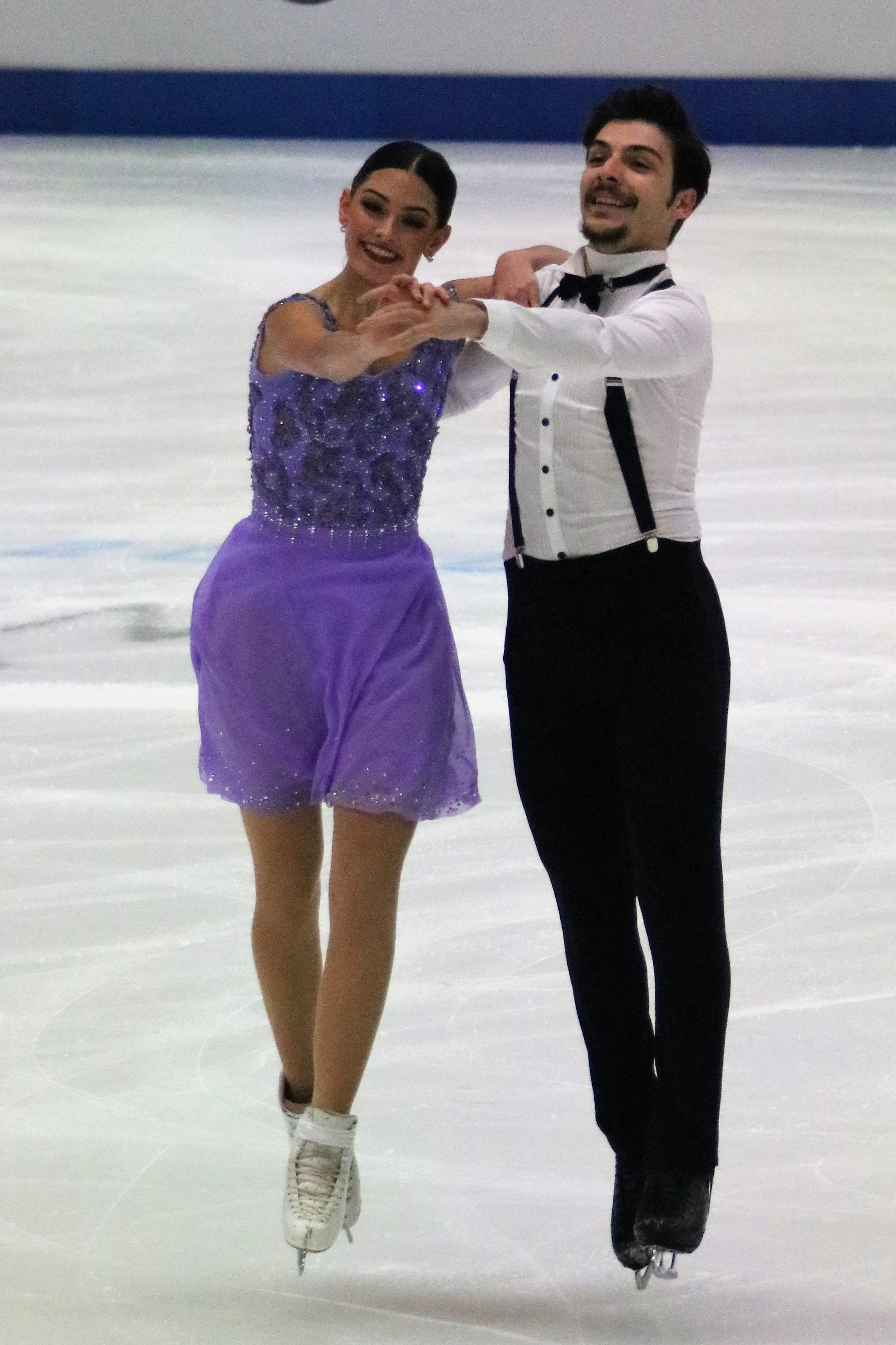 Николь Келли и Берк Акалын (Турция) на чемпионате Европы по фигурному катанию 2020